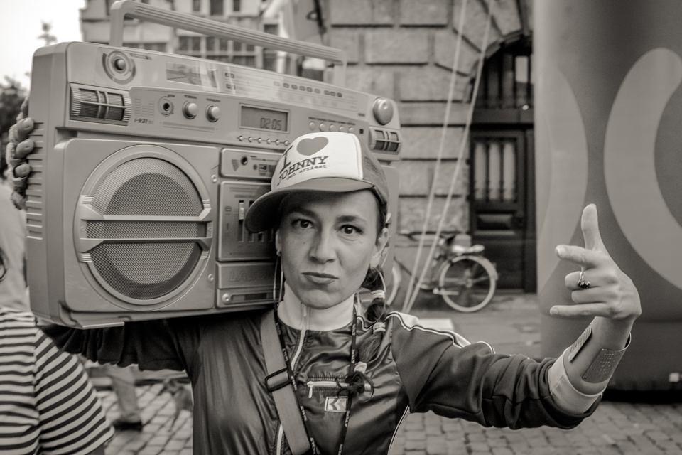 Charissa Parassiadis alias Slongs Dievanongs